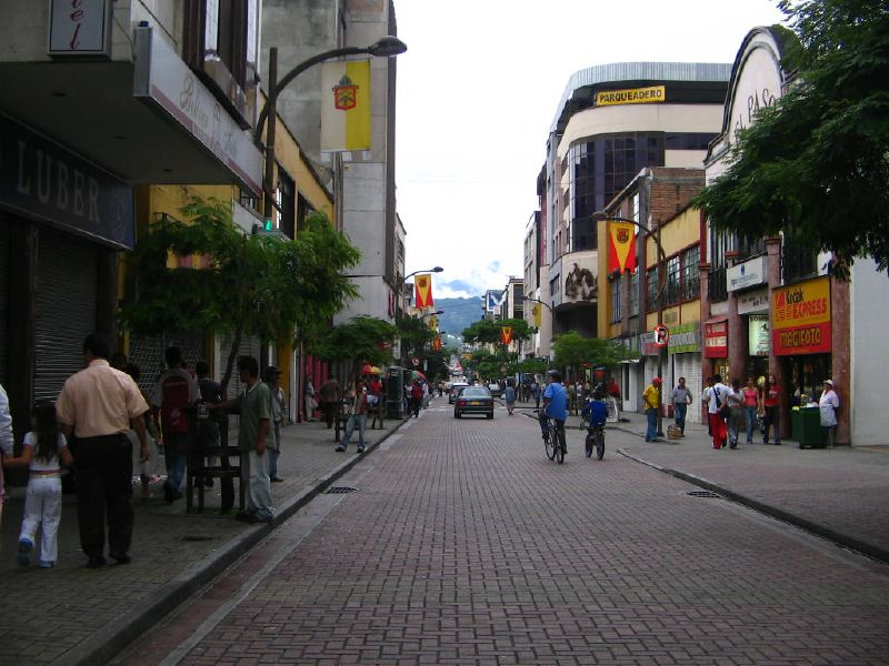 Una calle en Pereira. Colombia